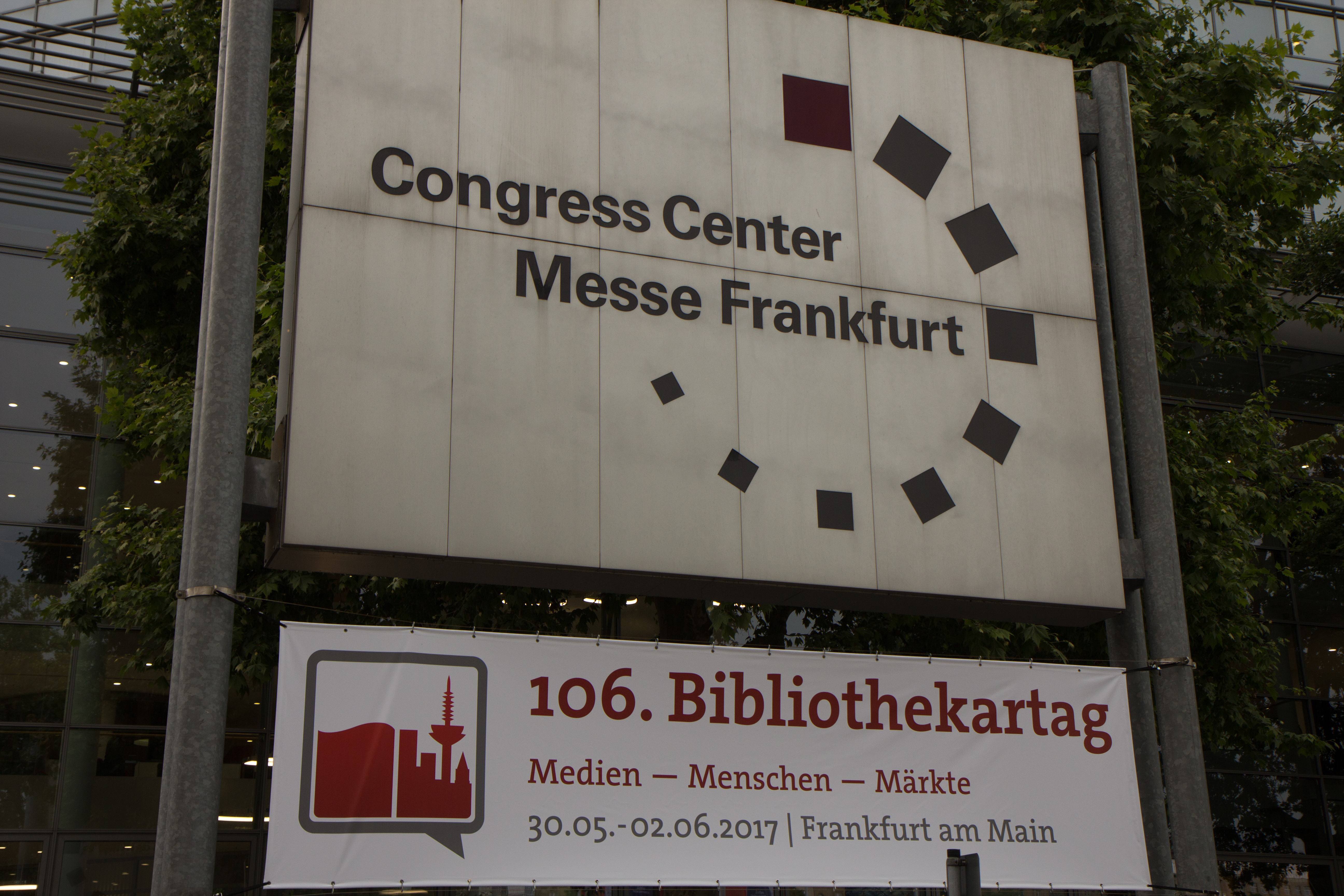 106. Deutscher Bibliothekartag in Frankfurt/Main